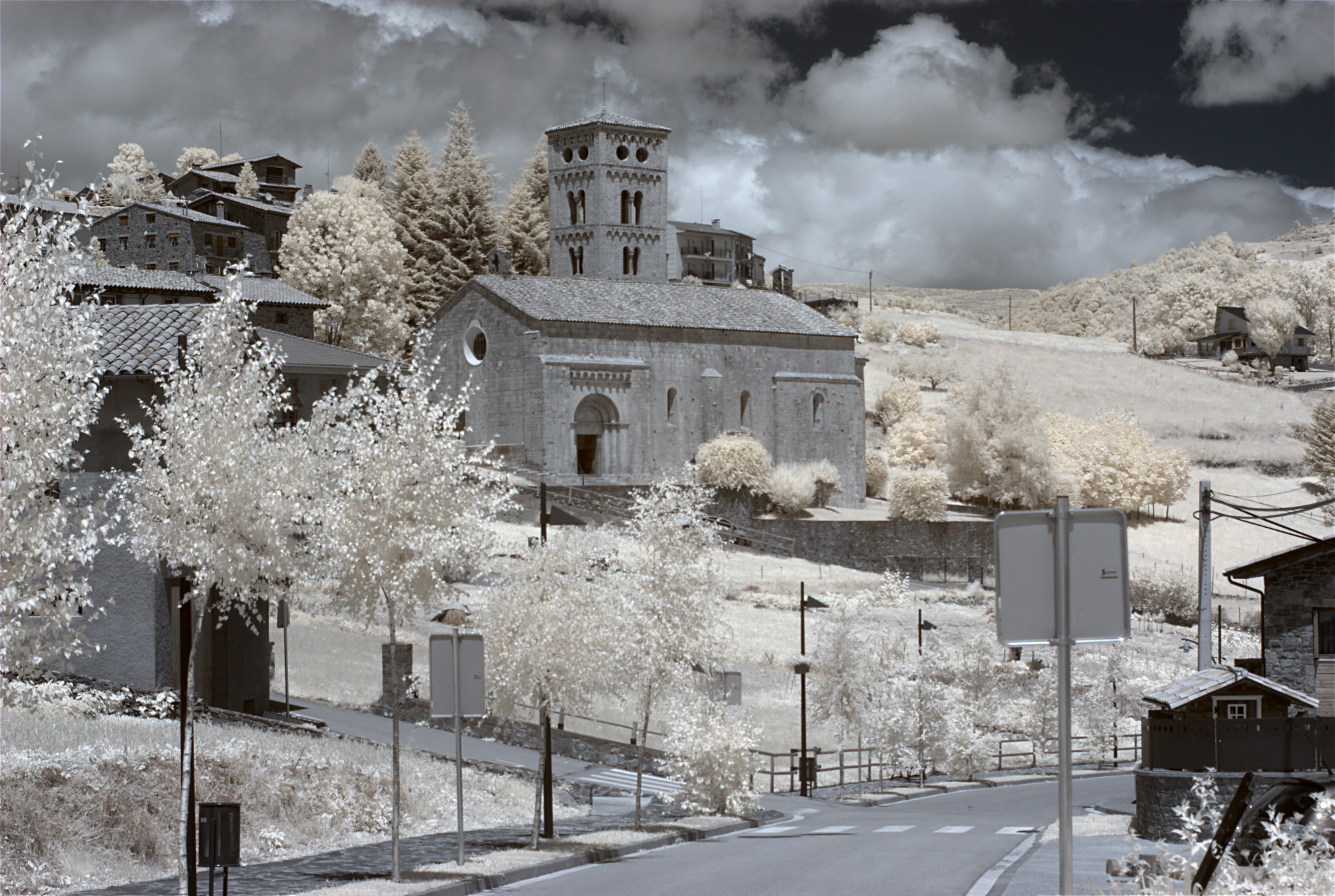 Église Sainte-Cécile, Molló (Ripollès, Catalogne, Espagne) photographiée avec un filtre infrarouge 720 nm.